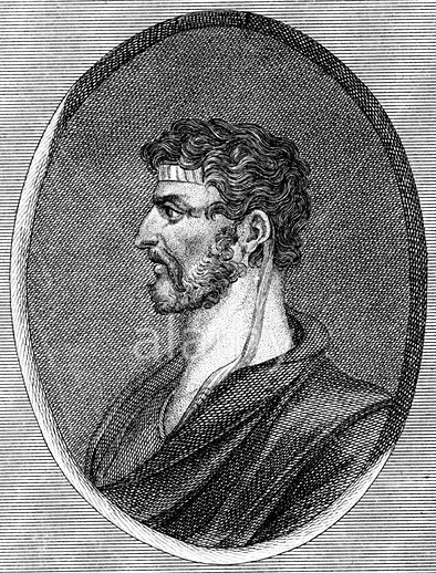 Immagine tratta da un libro del 18° secolo.